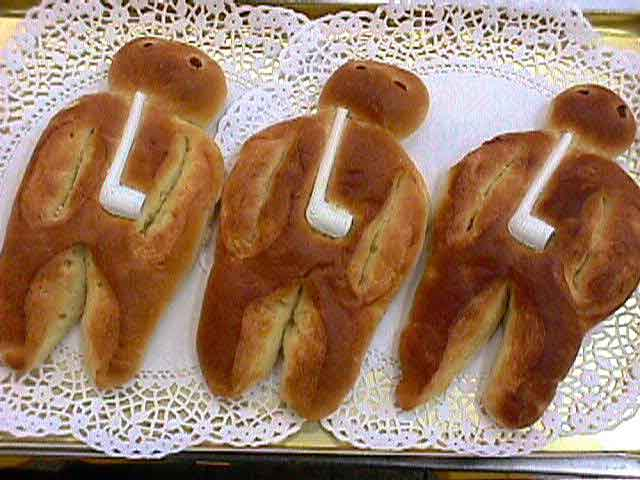 Weckmann Stutenkerl - Gebildebrot aus Hefeteig mit Pfeife, die nicht alle seine Vertreter haben.